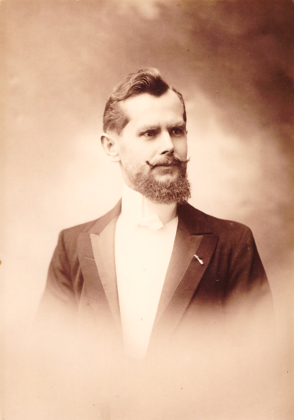 Porträt des Kürschners Paul Larisch (* 24. Mai 1870 in Frankenstein/Schlesien; † 26. September 1934 in Berlin).